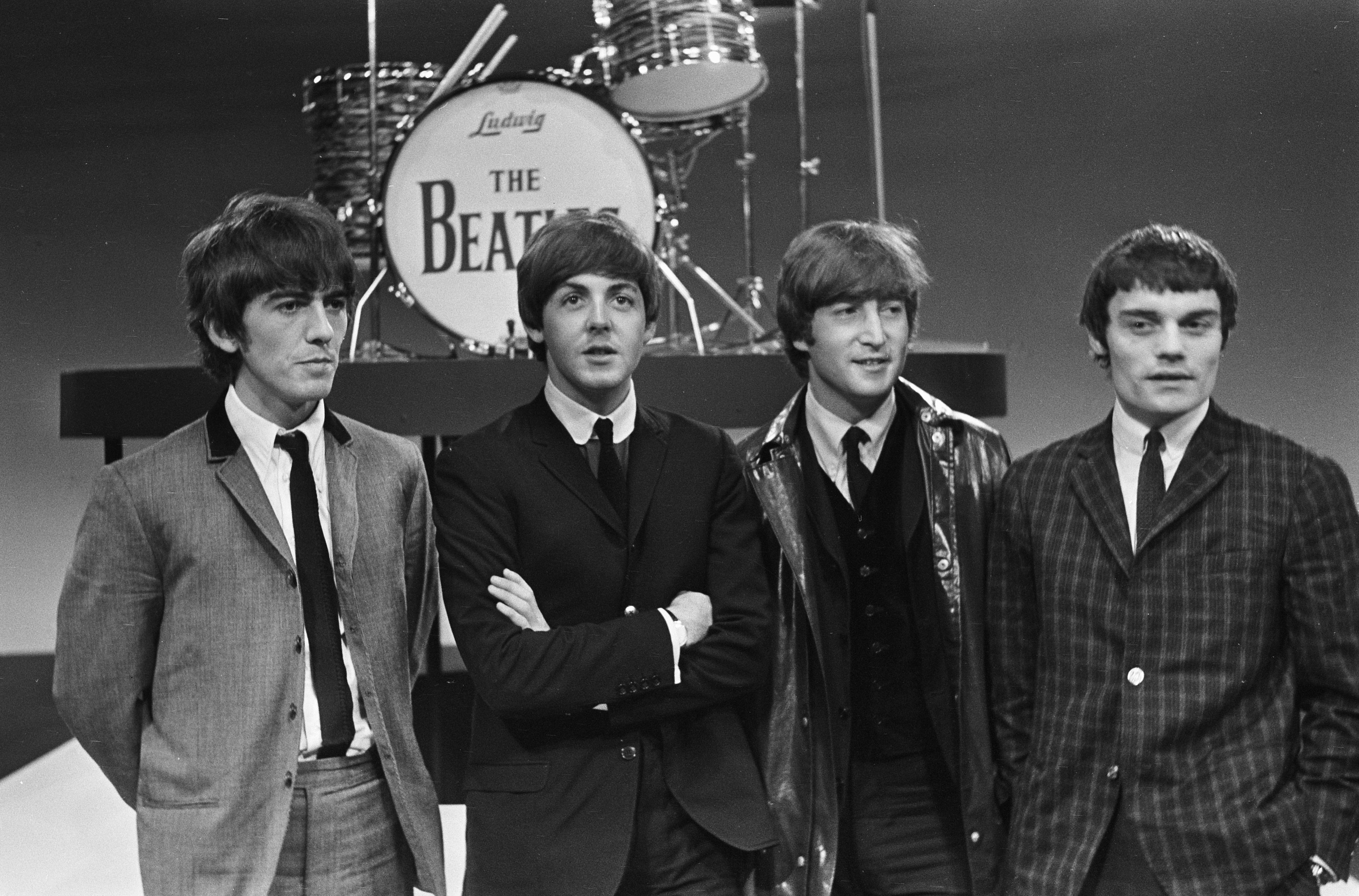 The Beatles tijdens televisieopnames in Hillegom. Jimmie Nicol vervangt Ringo Starr.